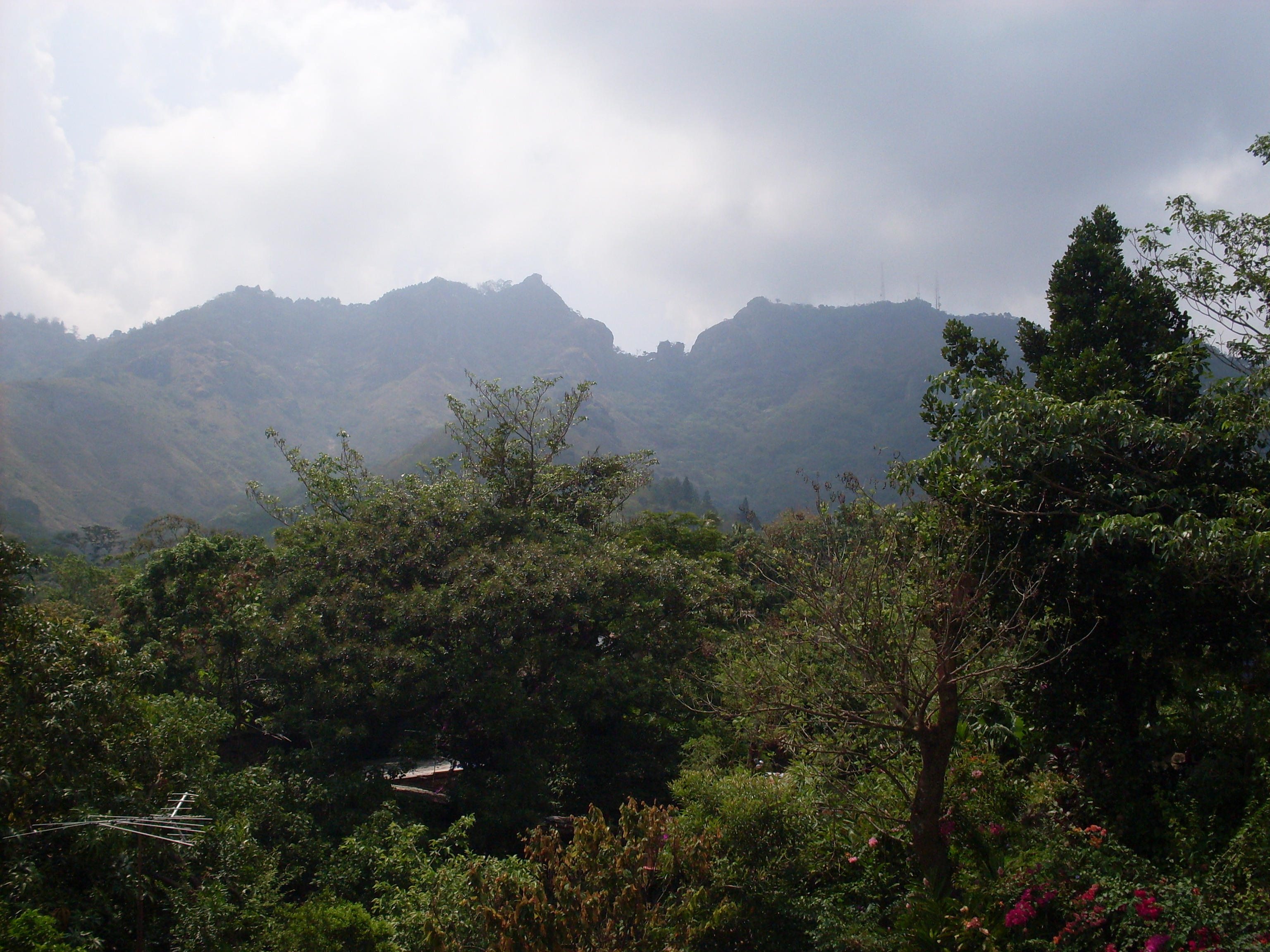 La Puerta del Diablo vista desde la ciudad de Panchimalco.